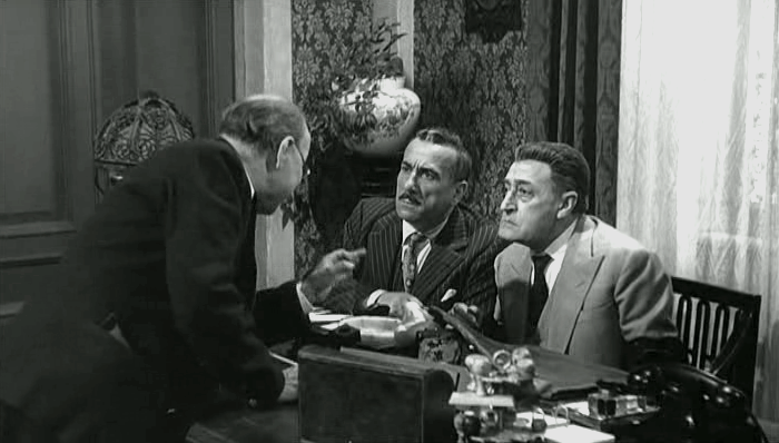 Chi si ferma è perduto Licensing Categoria:Immagini di Antonio De Curtis Categoria:Immagini di Peppino De Filippo